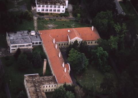 Szőlősgyörök, Hungary, aerialphotography (Jankovich Mansion)